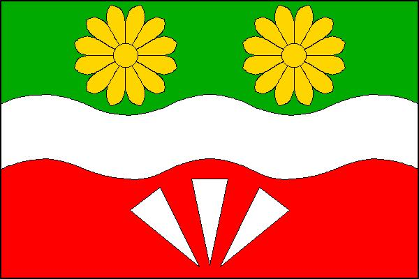 Vlajka obce Srbsko